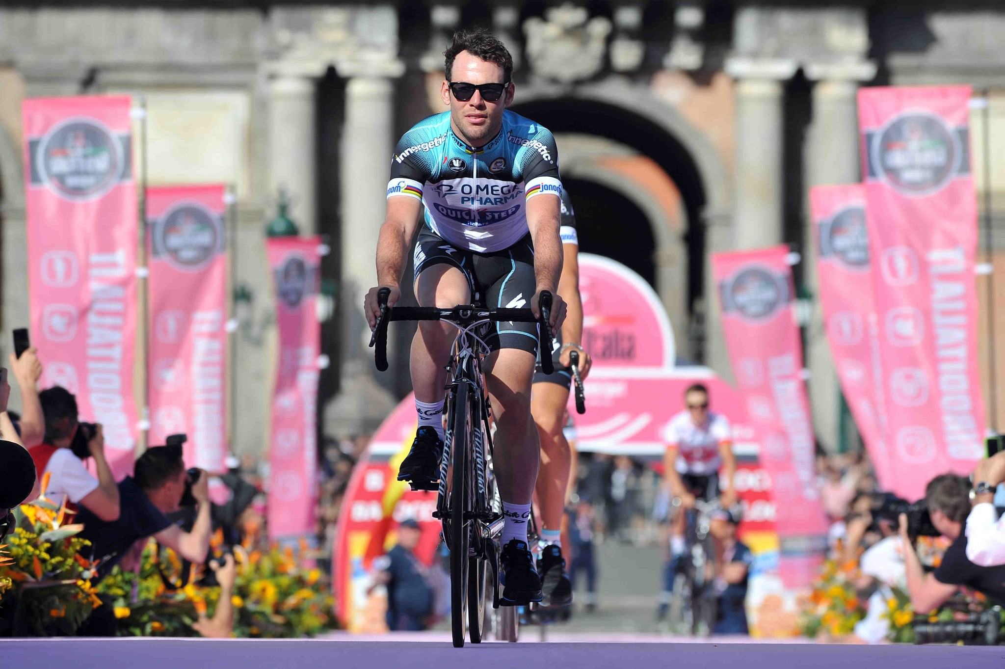 96mo Giro d'Italia, Presentación de equipos